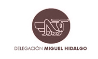 MH ESCUDO